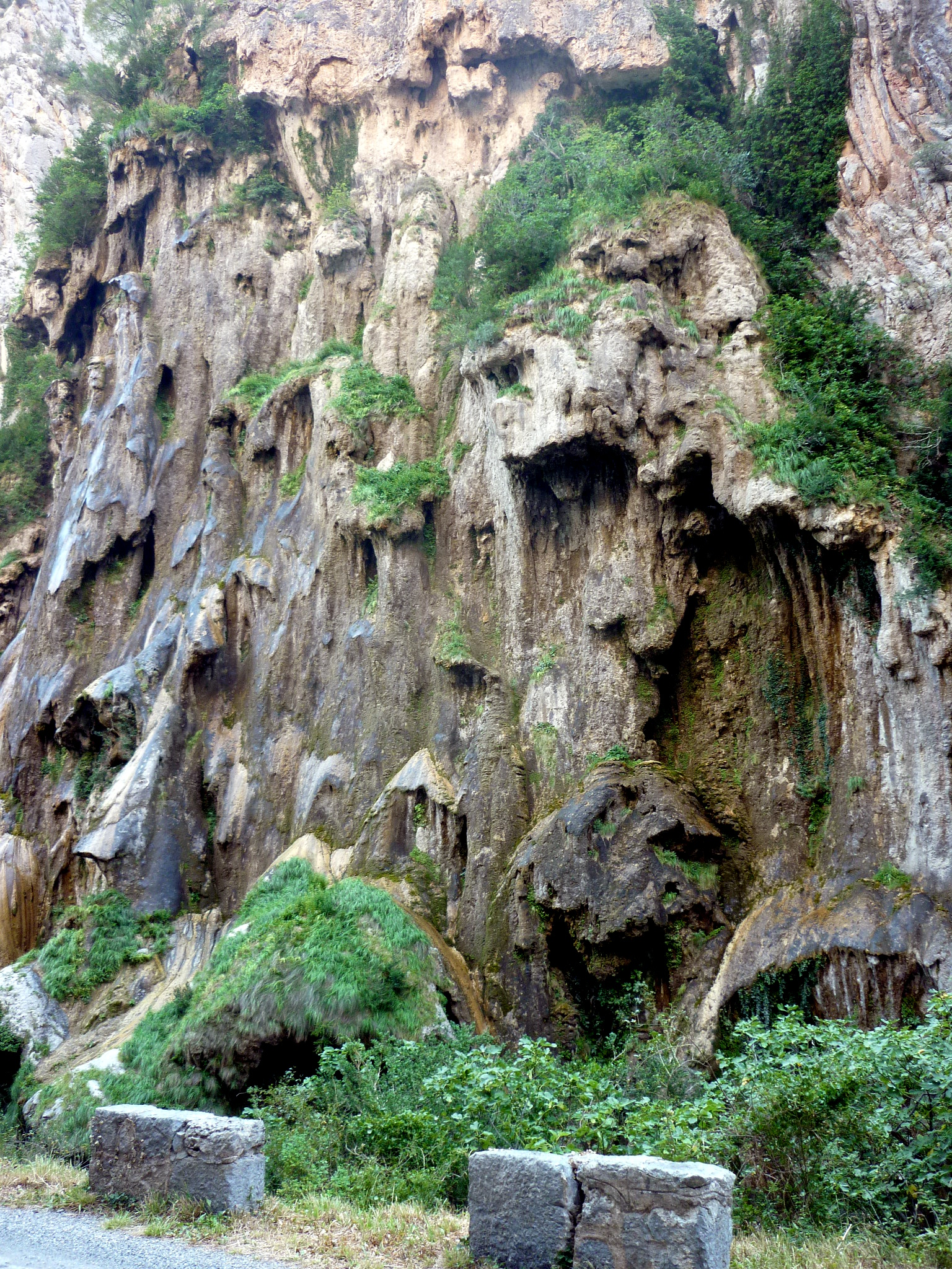 L'Argenteria, formació de travertí, al congost de Collegats This is a a photo of a natural area in Catalonia, Spain, with id: ES510098